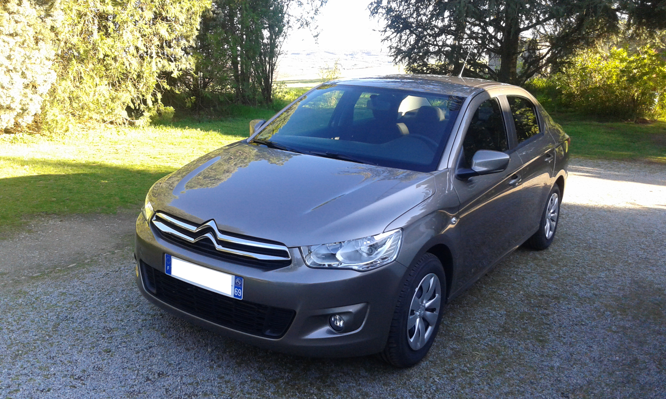 Vue avant. Citroën C-Elysée. Confort. Pack urbain. Brun nocciola. 1.2 Puretech 82. Modèle français de 2017.